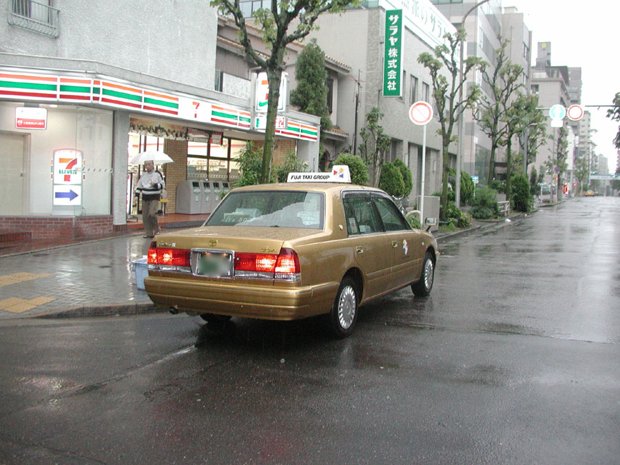 フジタクシーの金タクシー 名古屋市中区で撮影